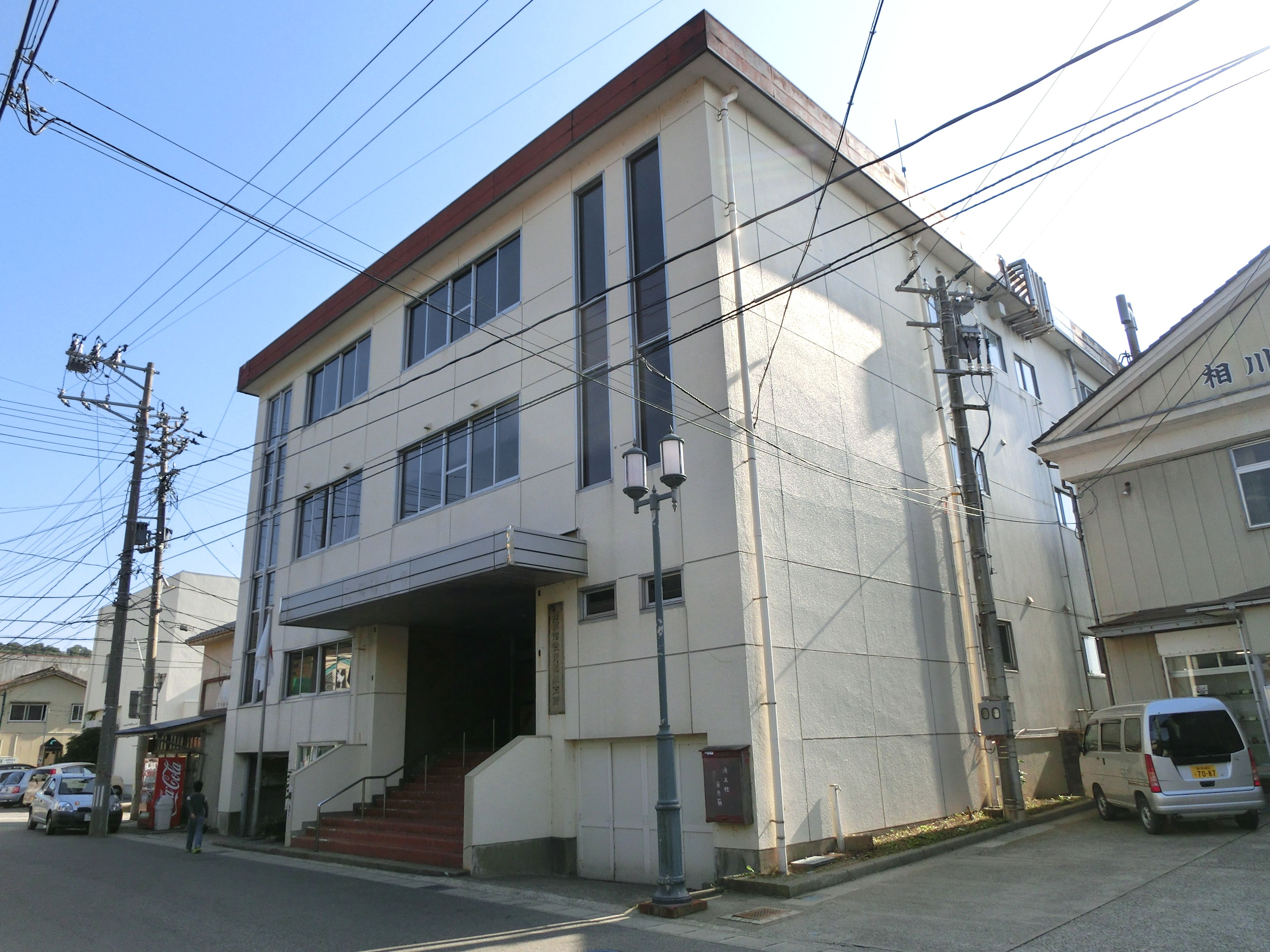 佐渡市役所相川支所